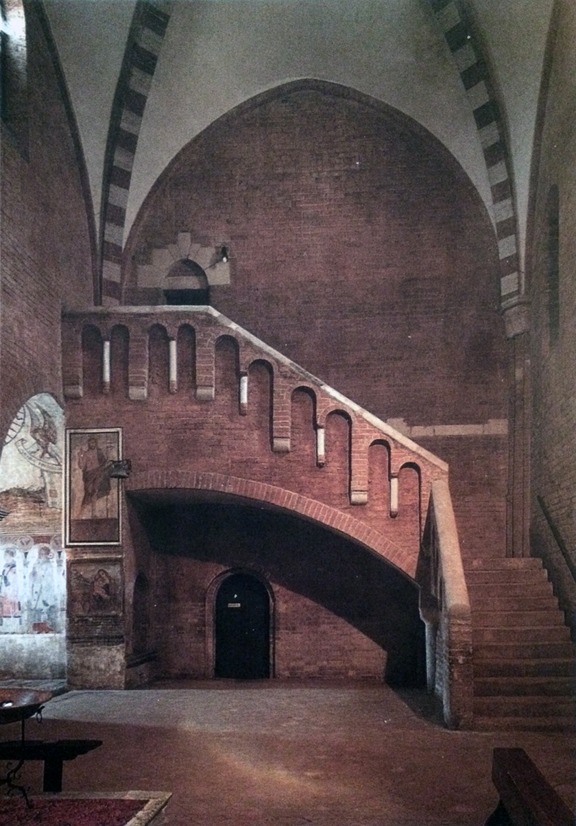 Scala di accesso al dormitorio nel transetto di destra dell'abbazia di Rivalta Scrivia